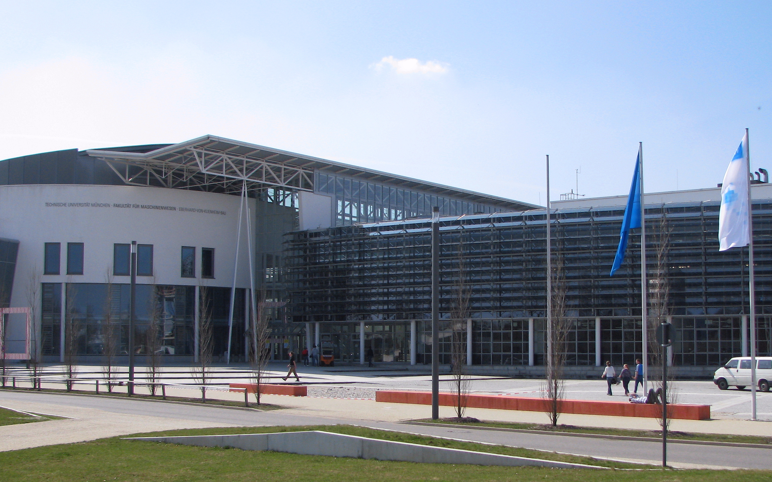 Technische Universität München (TUM) Fakultät für Maschinenwesen Eberhard-von-Kuenheim-Bau München Garching - Foto Wolfgang Pehlemann IMG_1589